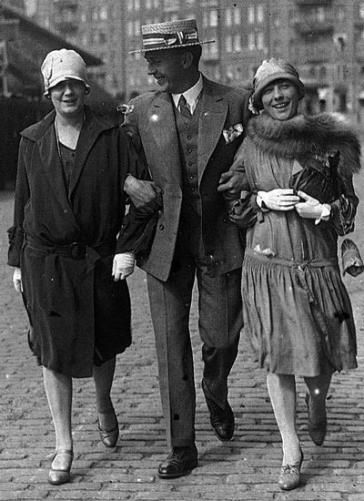 Lars Egge i Stockholm 1928 [Tillägg: flankerad av Maja Cassel och Elsa Wallin.]